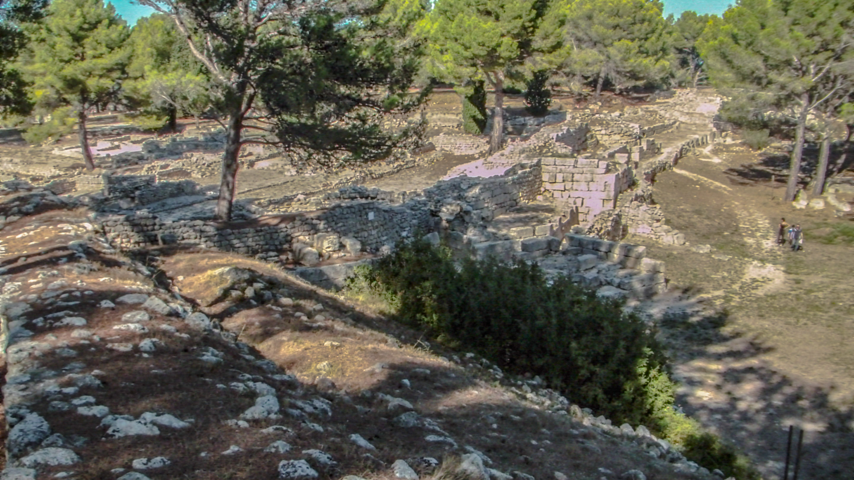 L'oppidum de Saint-Blaise est un site archéologique majeur en Méditerranée occidentale, situé sur la commune de Saint-Mitre-les-Remparts